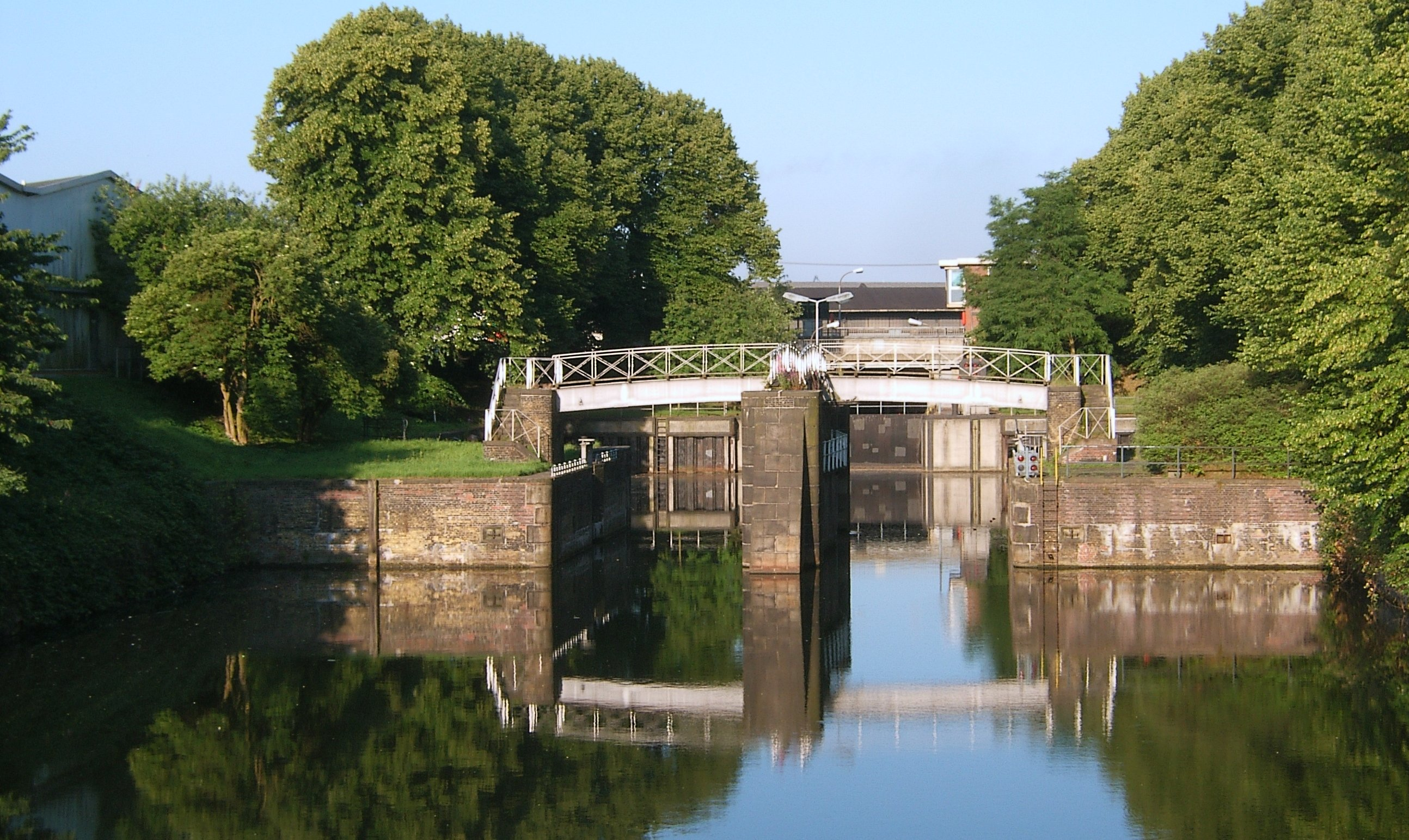 Die Hammerbrookschleuse in Hammerbrook schließt den Schleusenkanal und den ihm nachgelagerten Mittelkanal zum Oberhafen hin ab. This is a photograph of an architectural monument., no. 600